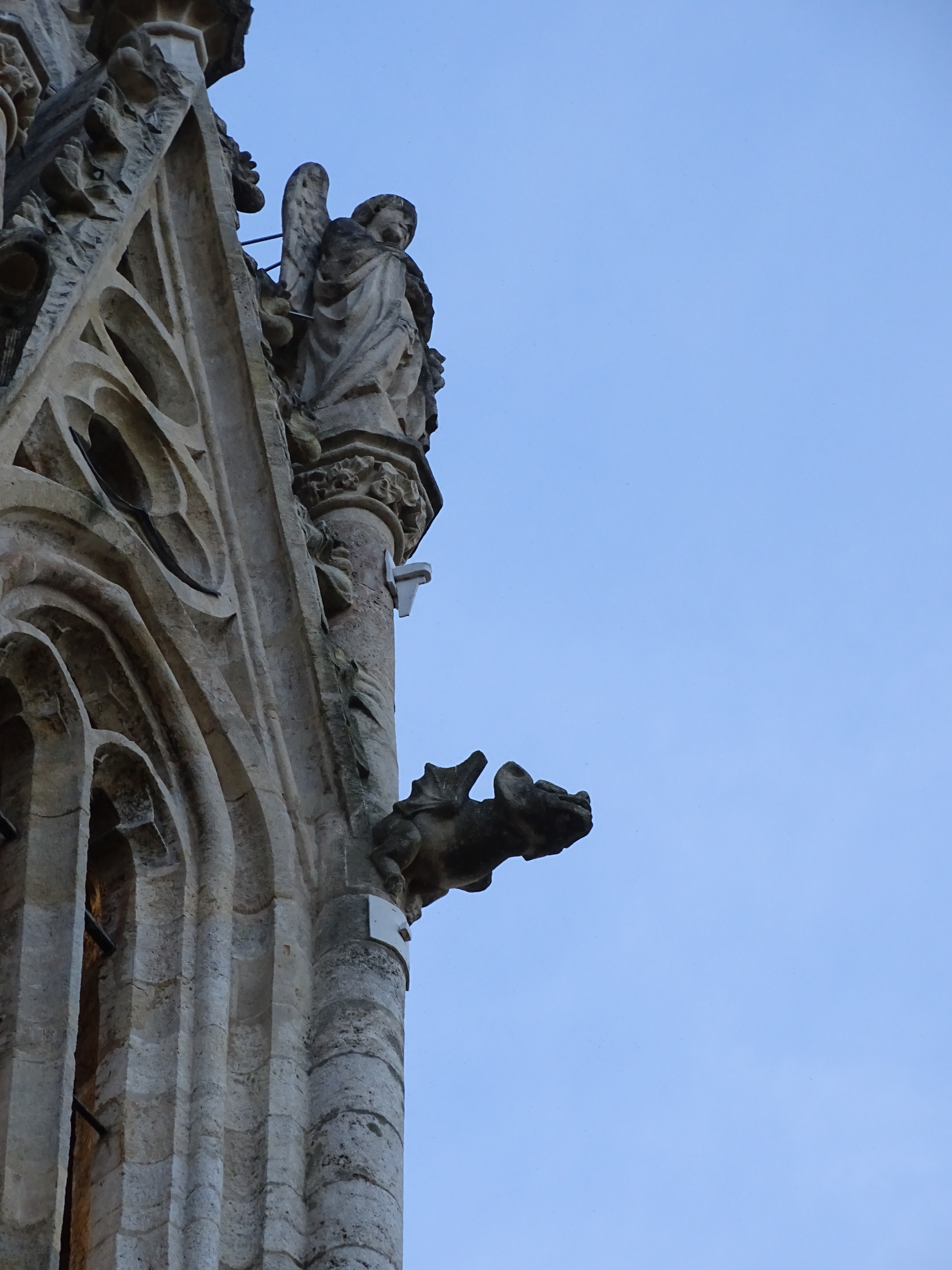 Ein Wasserspeier am Turm der Wallfahrtskirche Maria Straßengel